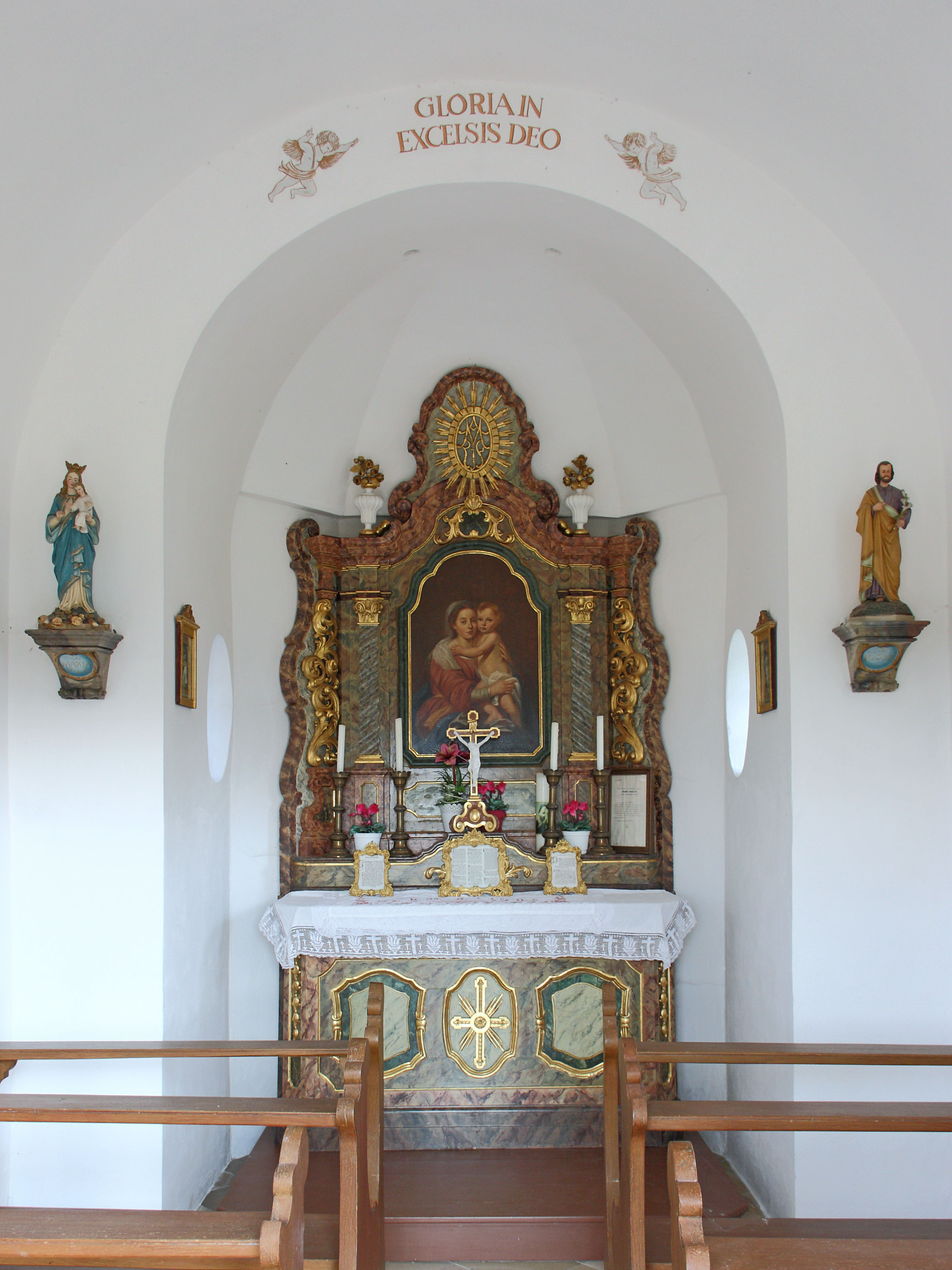 Innenansicht der nach Norden gerichteten Kapelle